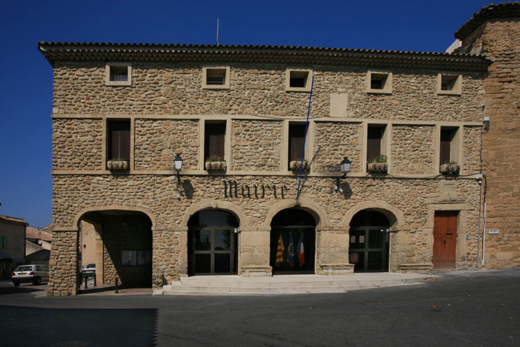 the village of Sérignan du Comtat, Vaucluse, France